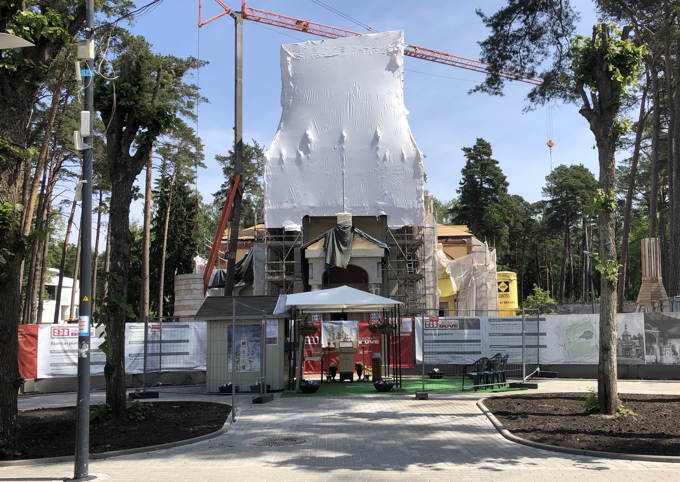 Kirchenneubau in Riga-Strand 2018